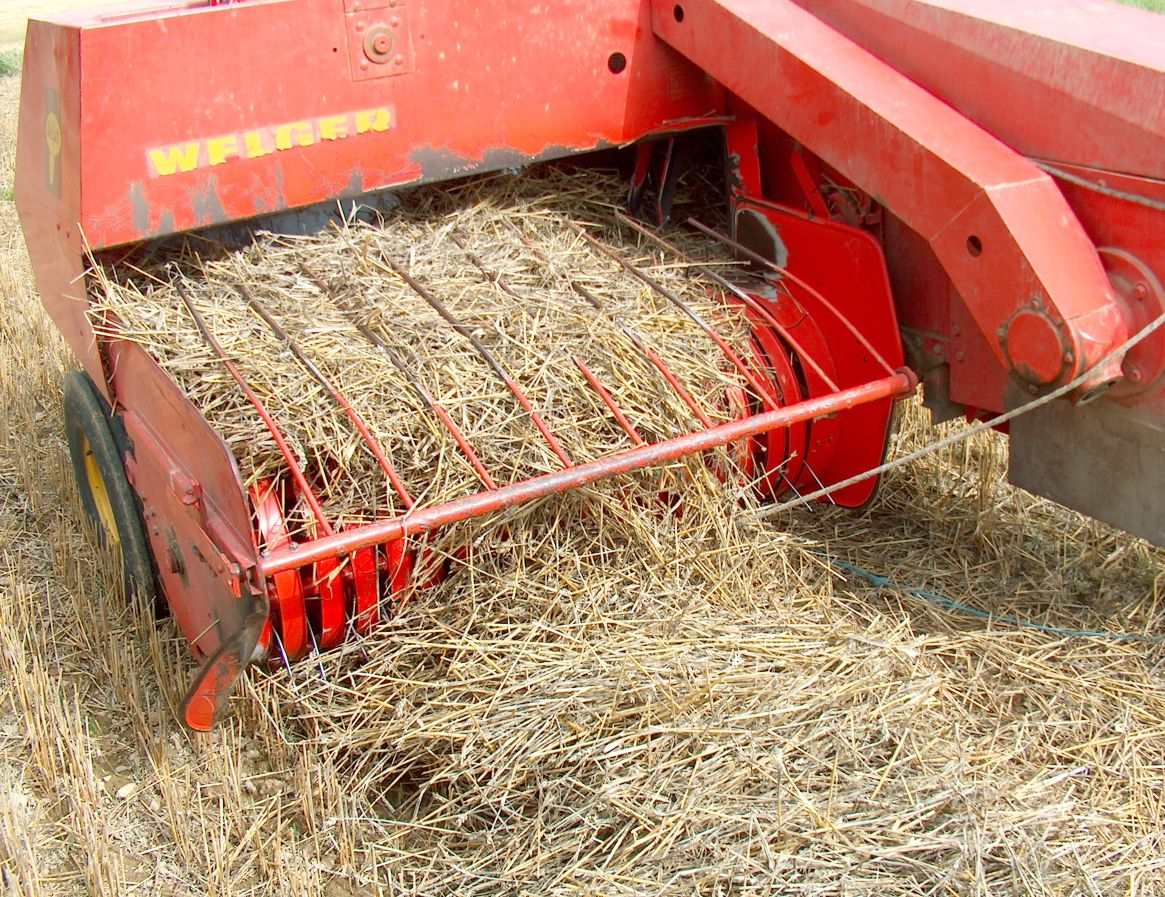 Pick-up eller opsamler på en ballepresse af mærket Welger